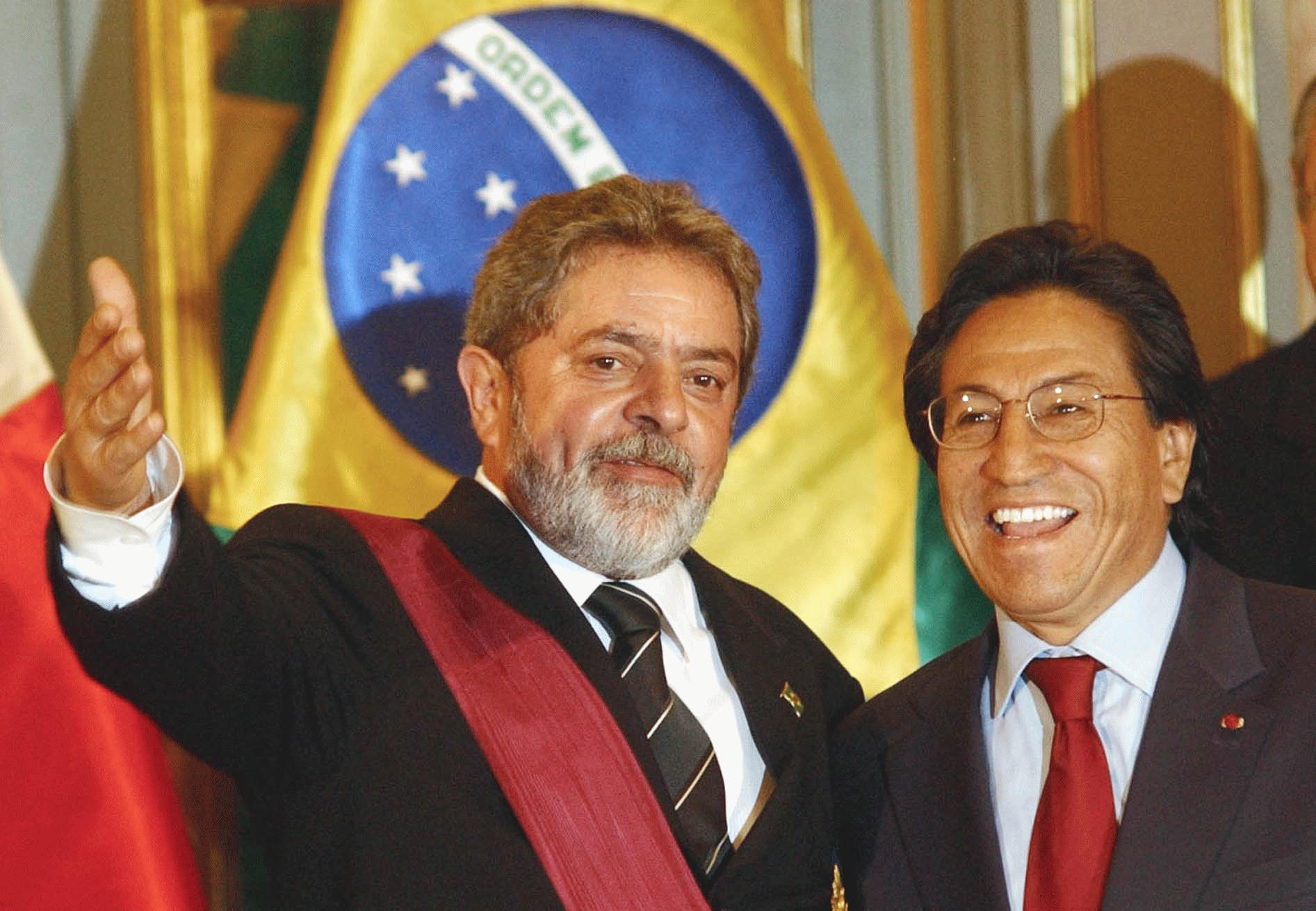 8682 Lima (Peru), 25/8/2003 (Agência Brasil - ABr) - O presidente Luiz Inácio Lula da Silva é recebido pelo presidente do Peru, Alejandro Toledo, no Palácio do Governo. (Foto: Marcello Casal Jr./ABr - hor - 04)